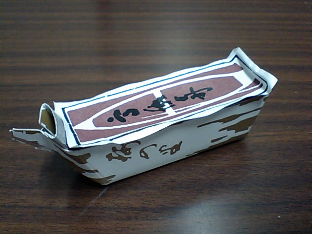 岡山銘菓 高瀬舟羊羹